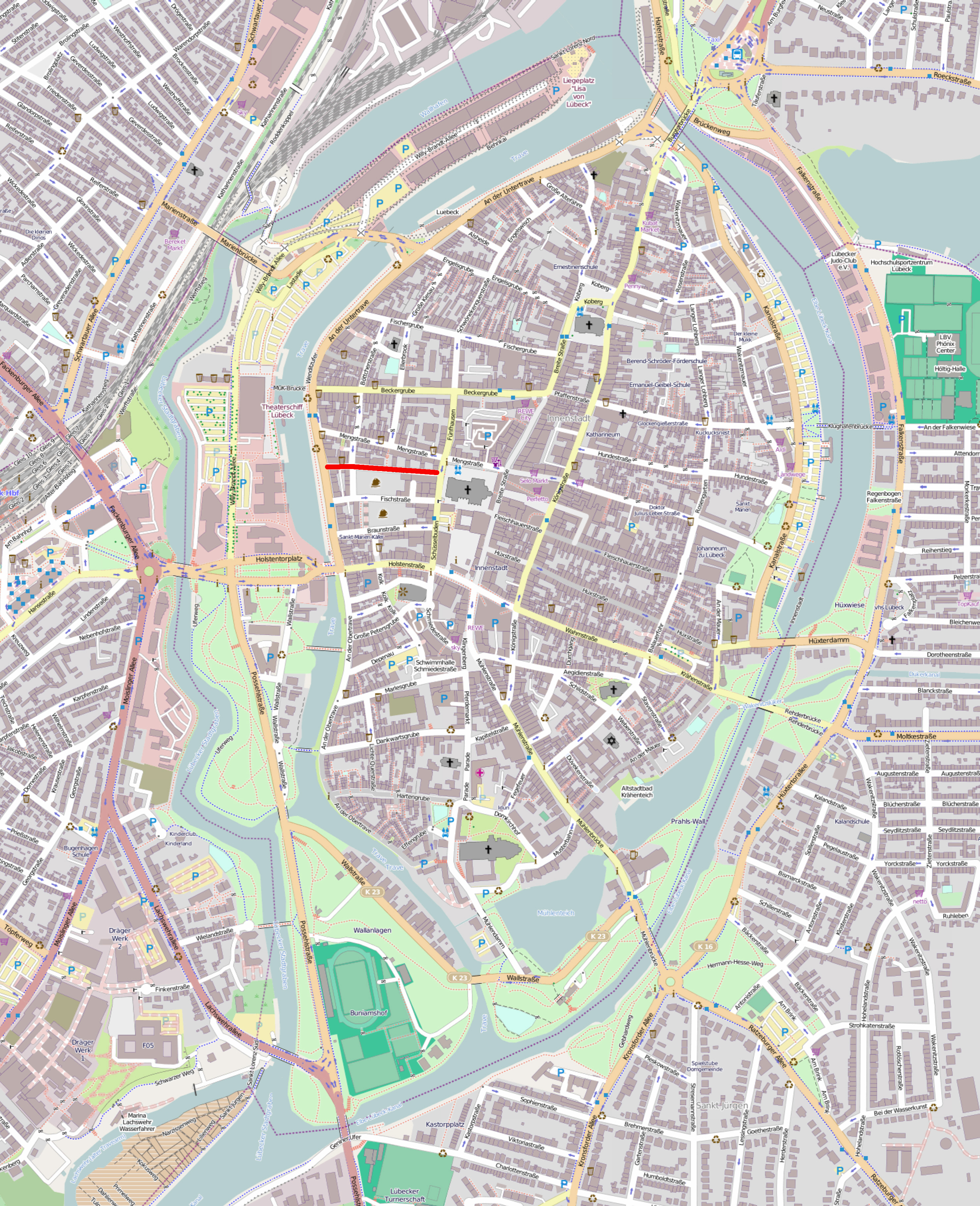 Die Alfstraße in Lübeck, rot markiert auf einer OpenStreetMap-Karte